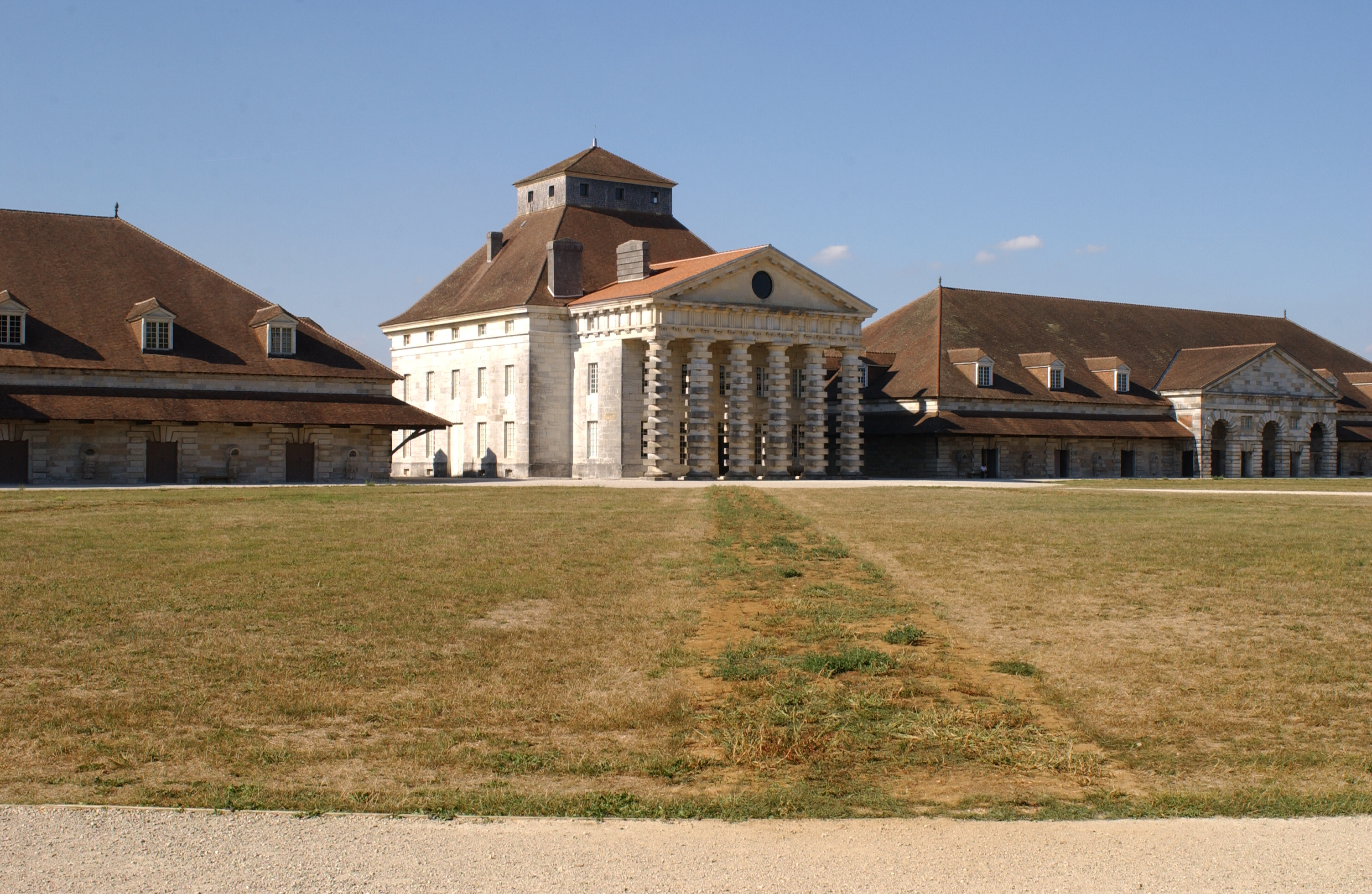 Saline Royale d'Arc et Senans.